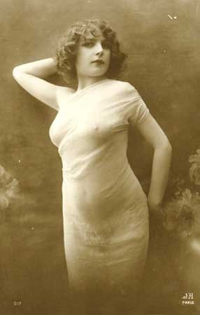 Fernande